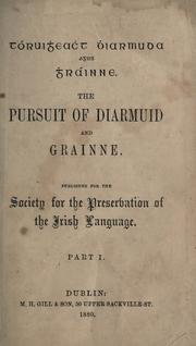 Tóruigheacht Dhiarmuda agus Ghráinne